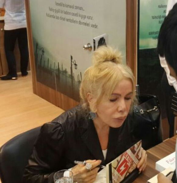 Füruzan'ın 2013 İstanbul Kitap Fuarı'ndaki imza günü